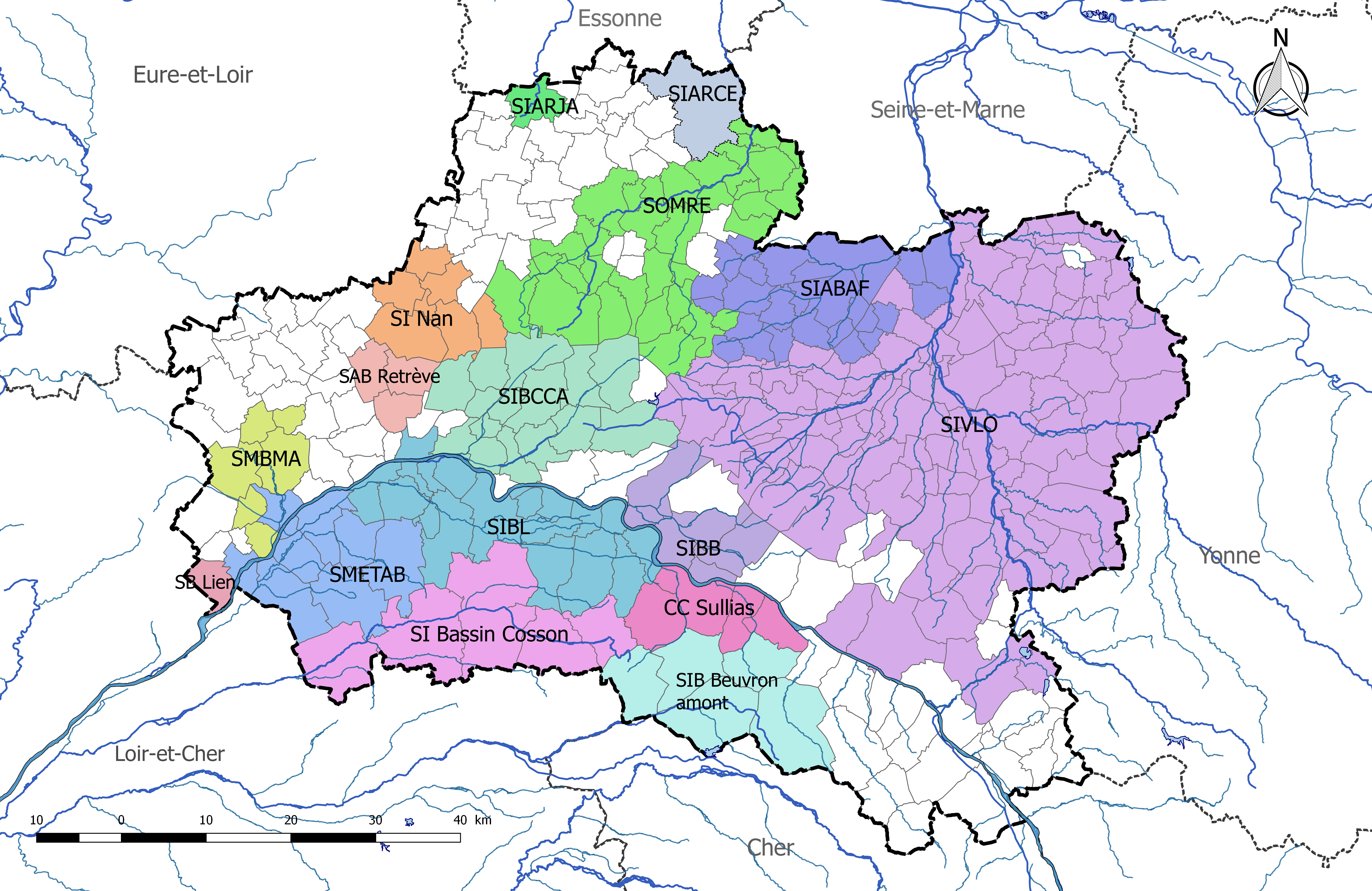 Carte des syndicats de rivière en activité en avril 2017 dans le Loiret.